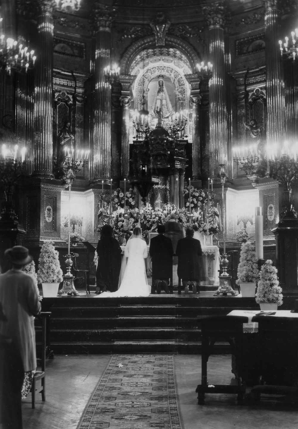 Fotografía durante una boda en la basílica de Begoña, Bilbao